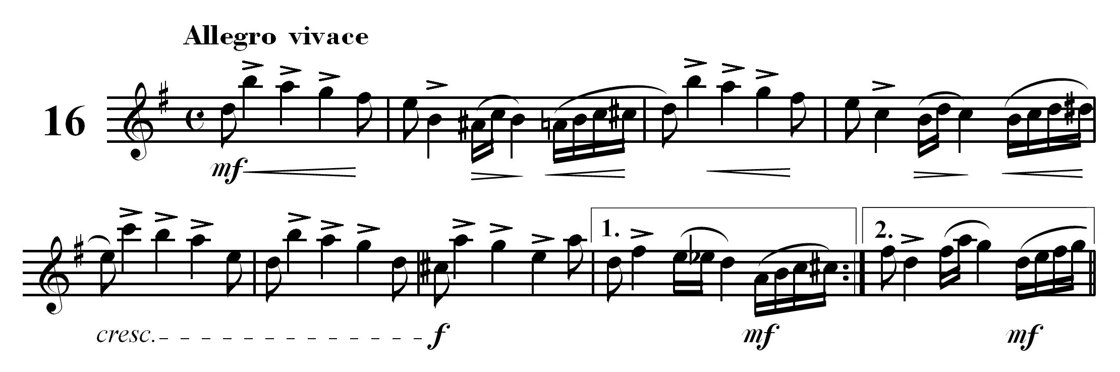 Srpskohrvatski / српскохрватски: Etida br. 16